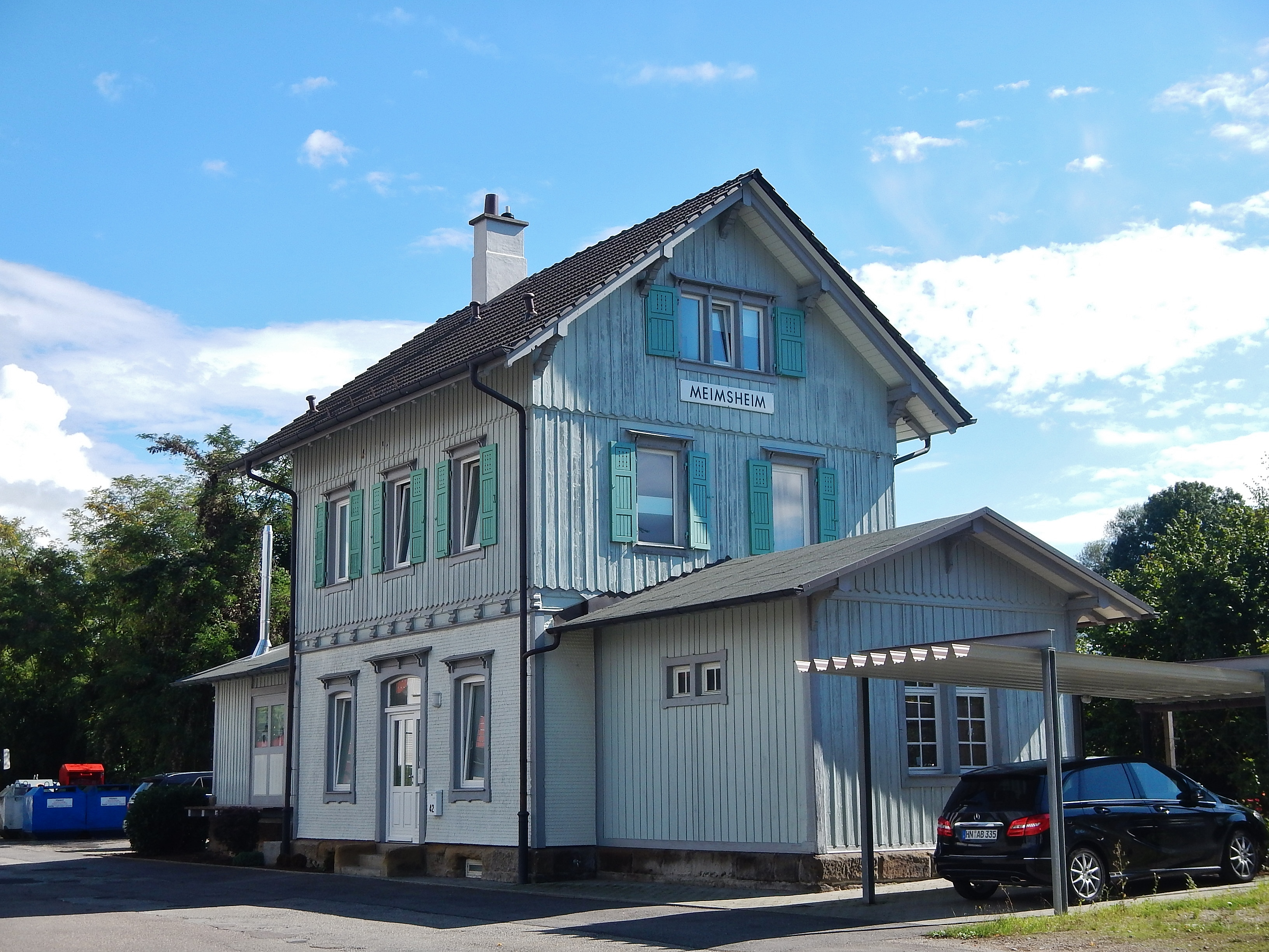 Bahnhof Meimsheim der Zabergäubahn bei Meimsheim: 1896 eröffnet, 1965 Umbau auf Normalspur, 1986 stillgelegt